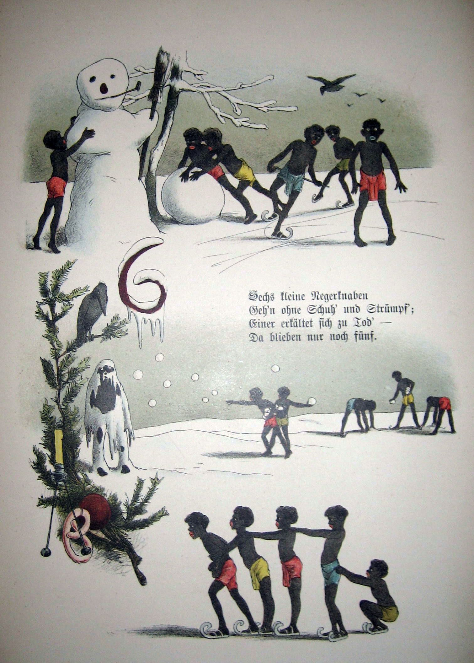 Seite aus einem Buch des Typs "Zehn kleine Negerlein"